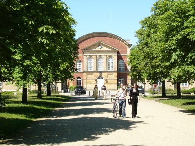 Universität Potsdam, Blick auf den Versammlungshof (Aula) und den größten Hörsaal (Audimax)